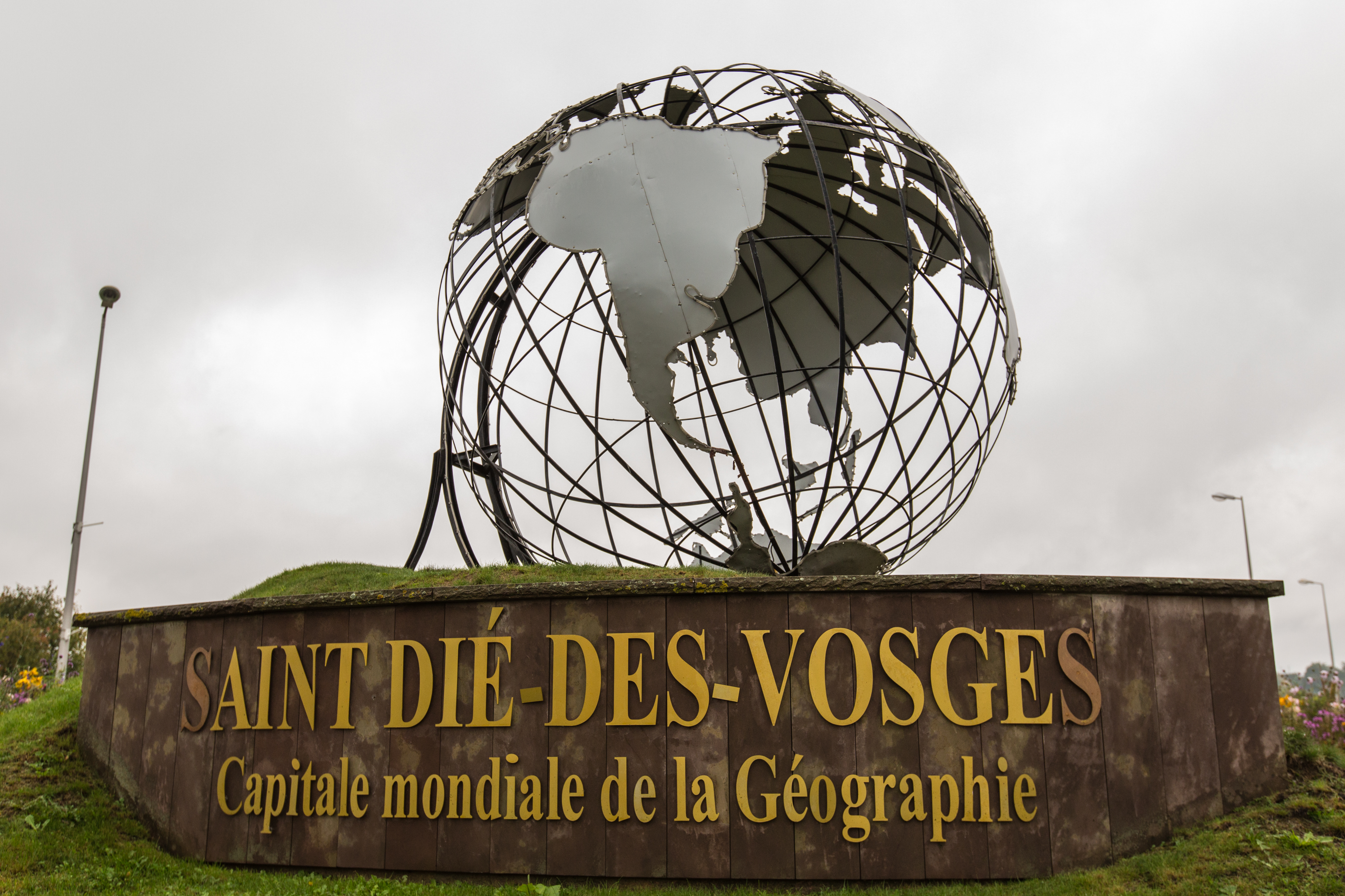 Rond point